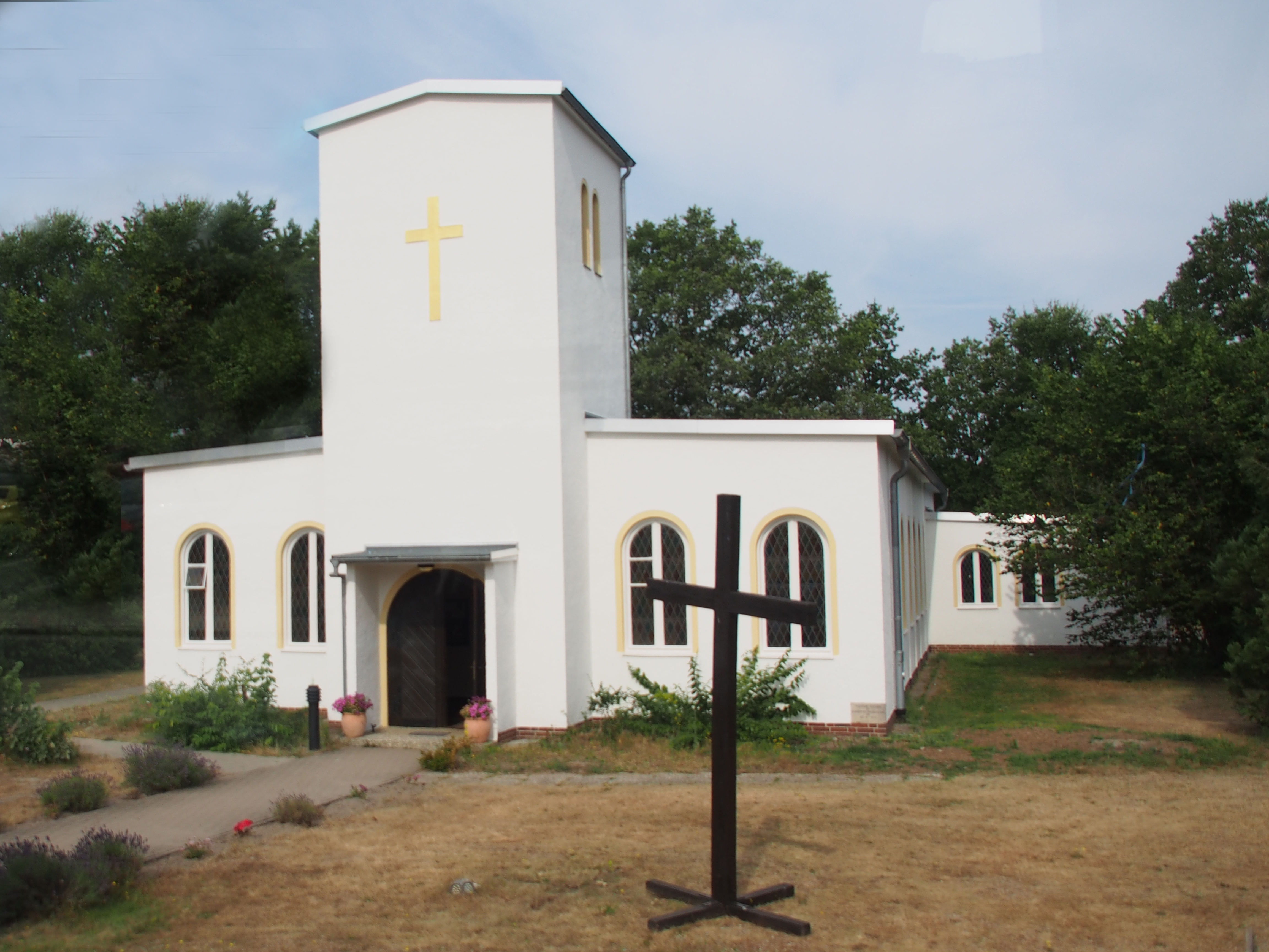 Garnisonskirche auf dem Kasernengelände Bergen-Hohne